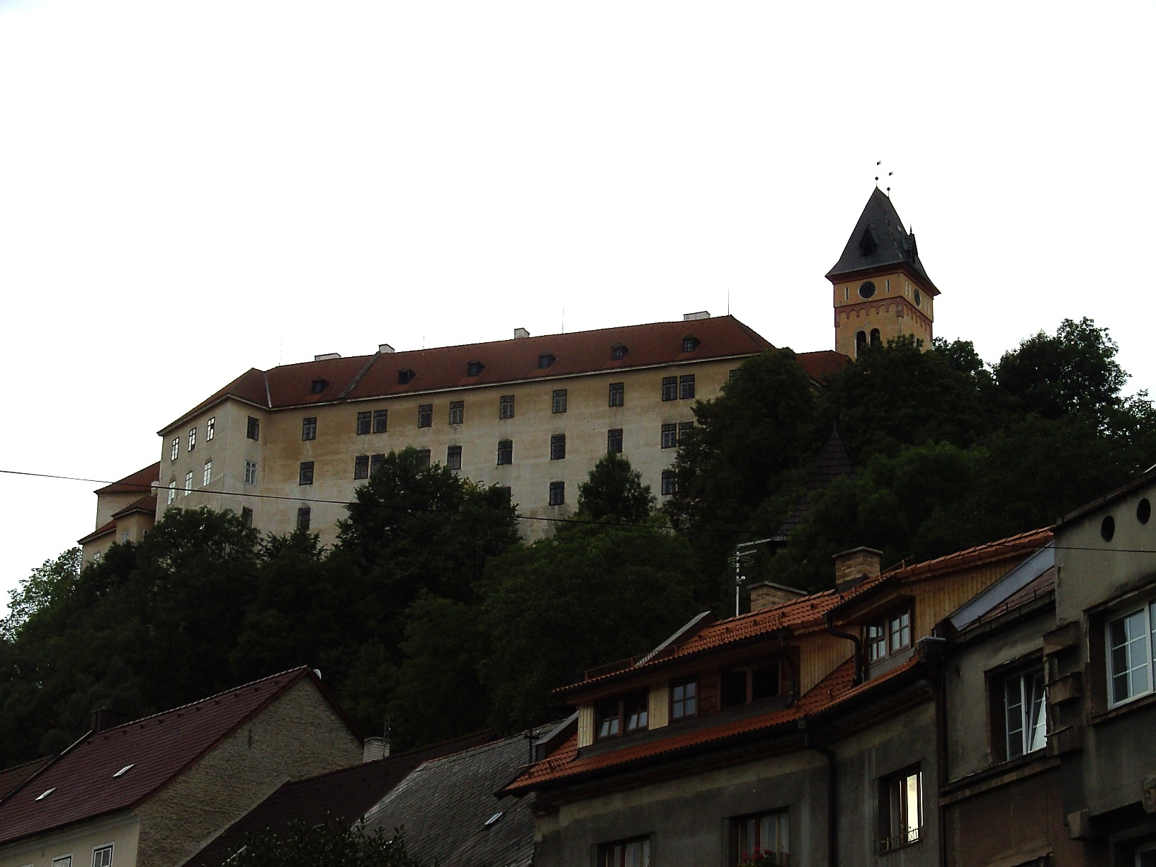 Vimperk Castle